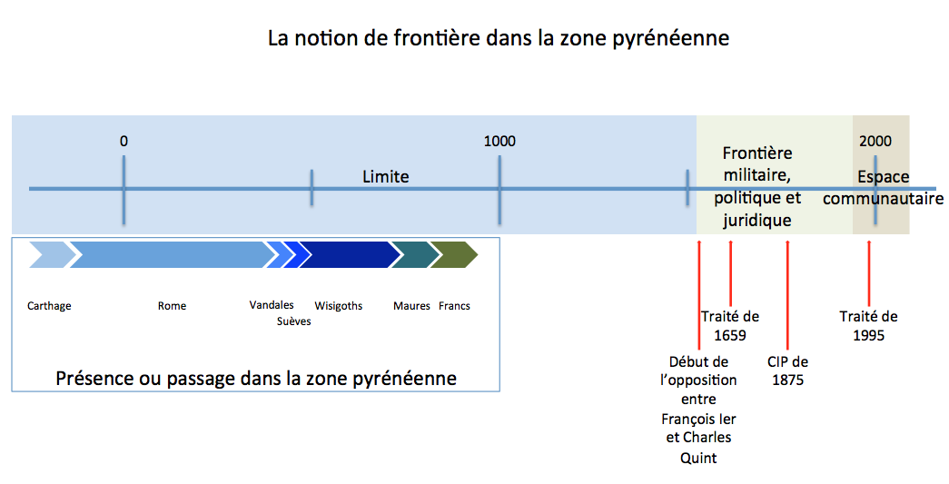 Frise chronologique du concept de frontière entre l'Espagne et la France